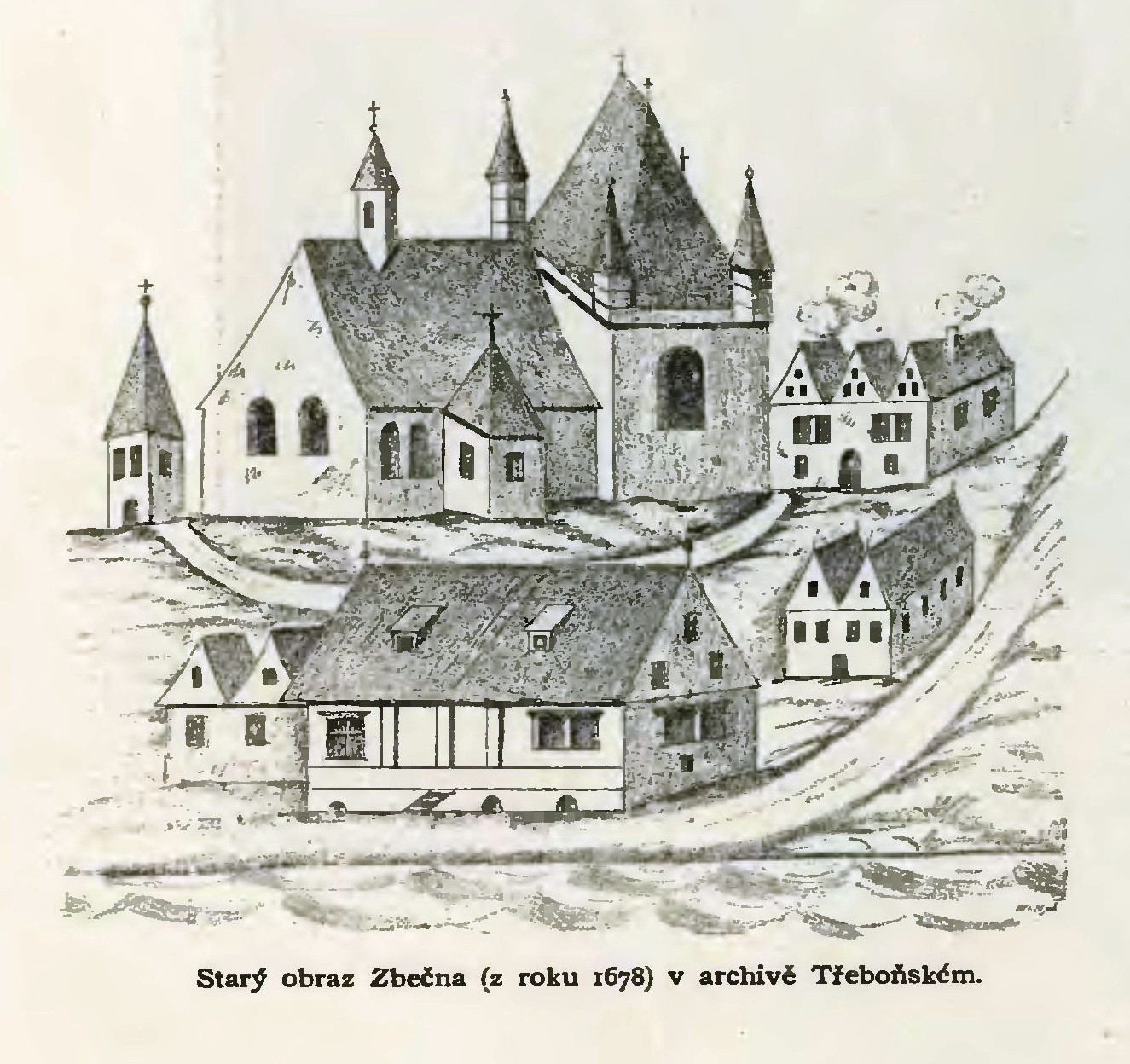 obraz kostela z r. 1678